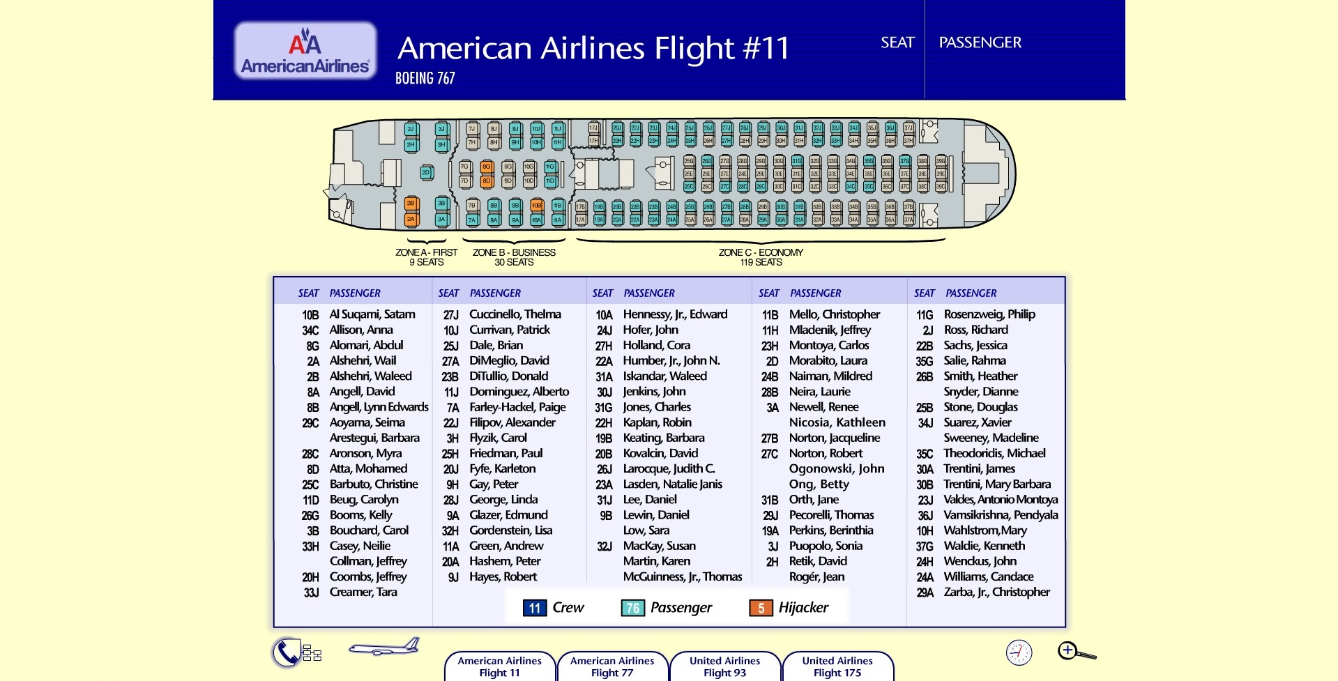 Auszug aus einer Flash-Präsentation, welche im Gerichtsverfahren United States vs. Zacarias Moussaoui (Nr. 01-455-A) verwendet wurde (